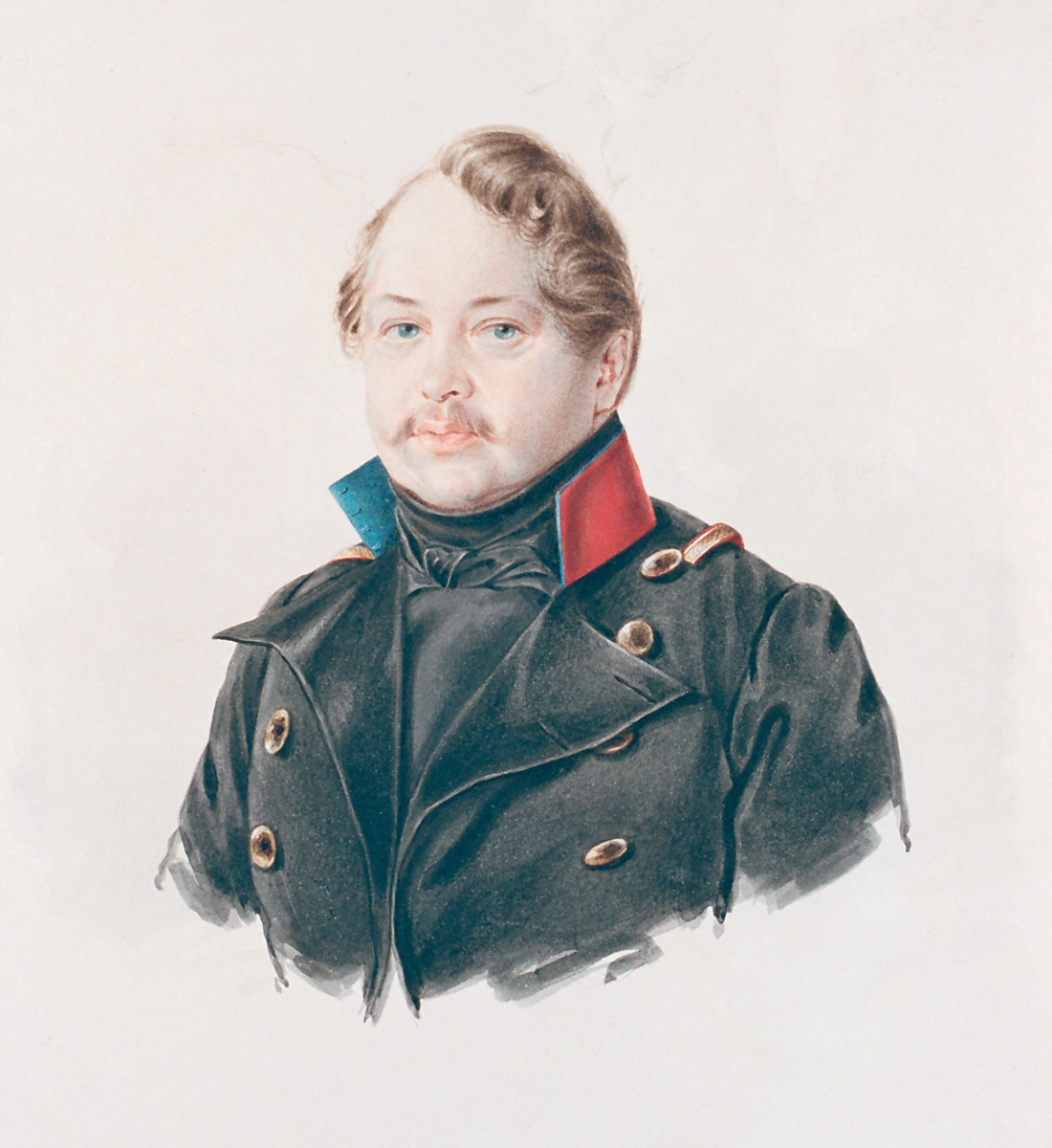 Павел Дмитриевич Соломирский (1801—1861) Pavel Solomirsky, Major-General and mine operator